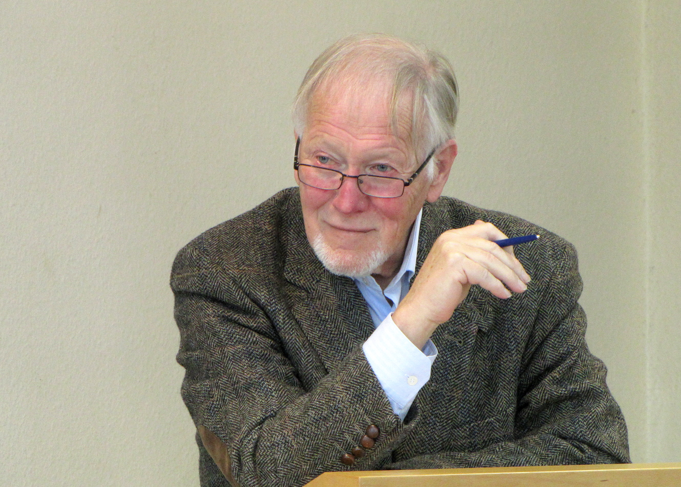 Prof. Dr. Horst Lademacher, Historiker. In Suderwick (Bocholt) bei einem Vortrag über die deutsche Besatzung der Niederlande 1940-1945.